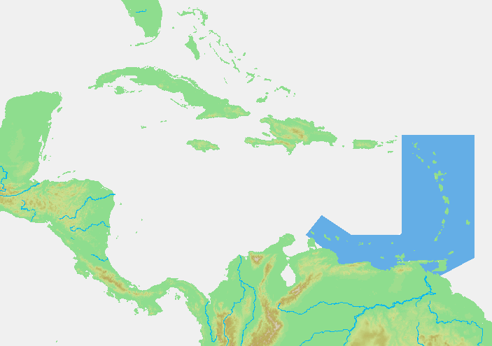 Caribbean - Lesser Antilles.PNG